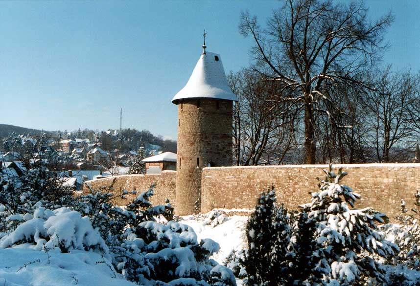 Halbschalenturm auf den Tuchmacherrähmen in Wernigerode